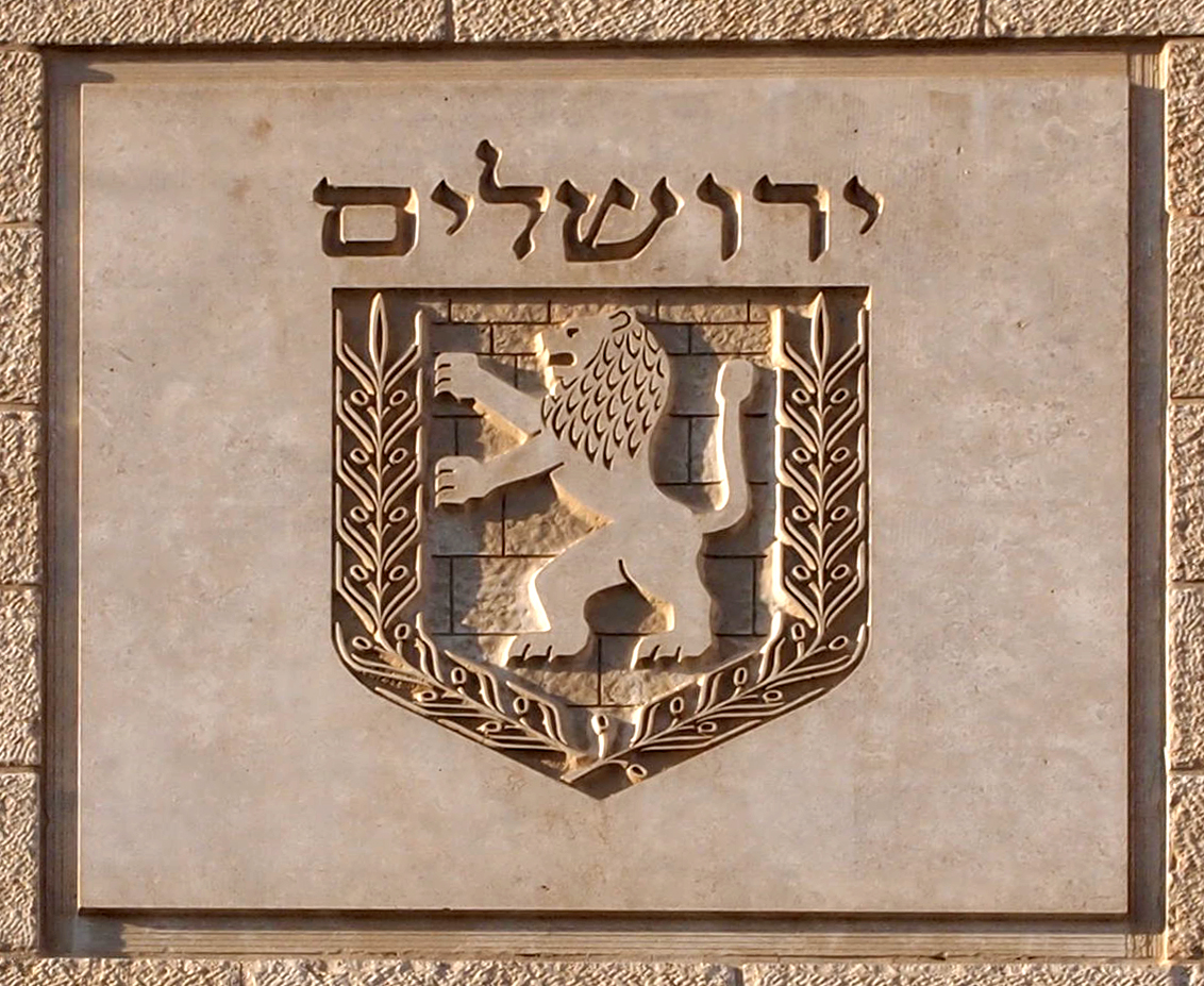 relief of the Emblem of Jerusalem